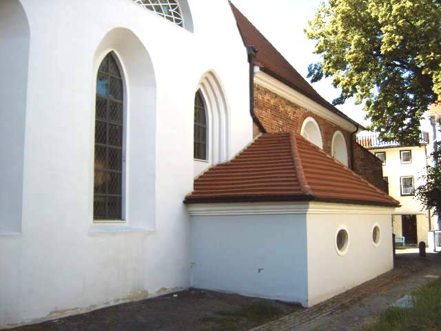 Wendisch-Deutsche Doppelkirche in Vetschau, Land Brandenburg, Deutschland Sakristei vor den Kirchenschiffen Bild aufgenommen am 26.6.2006 von Olaf Meister